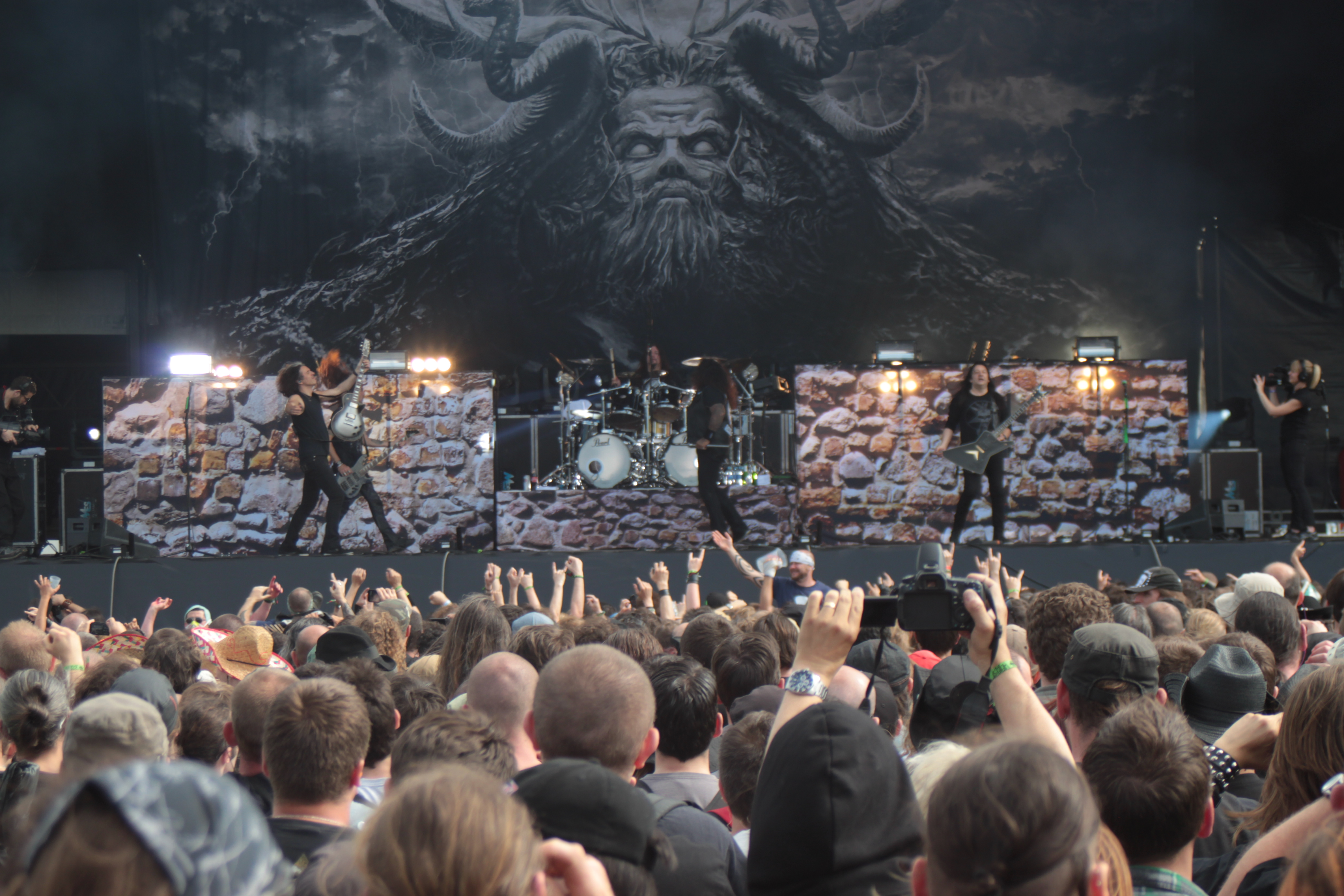 Testament, Hellfest 2013, Fr-44-Clisson.